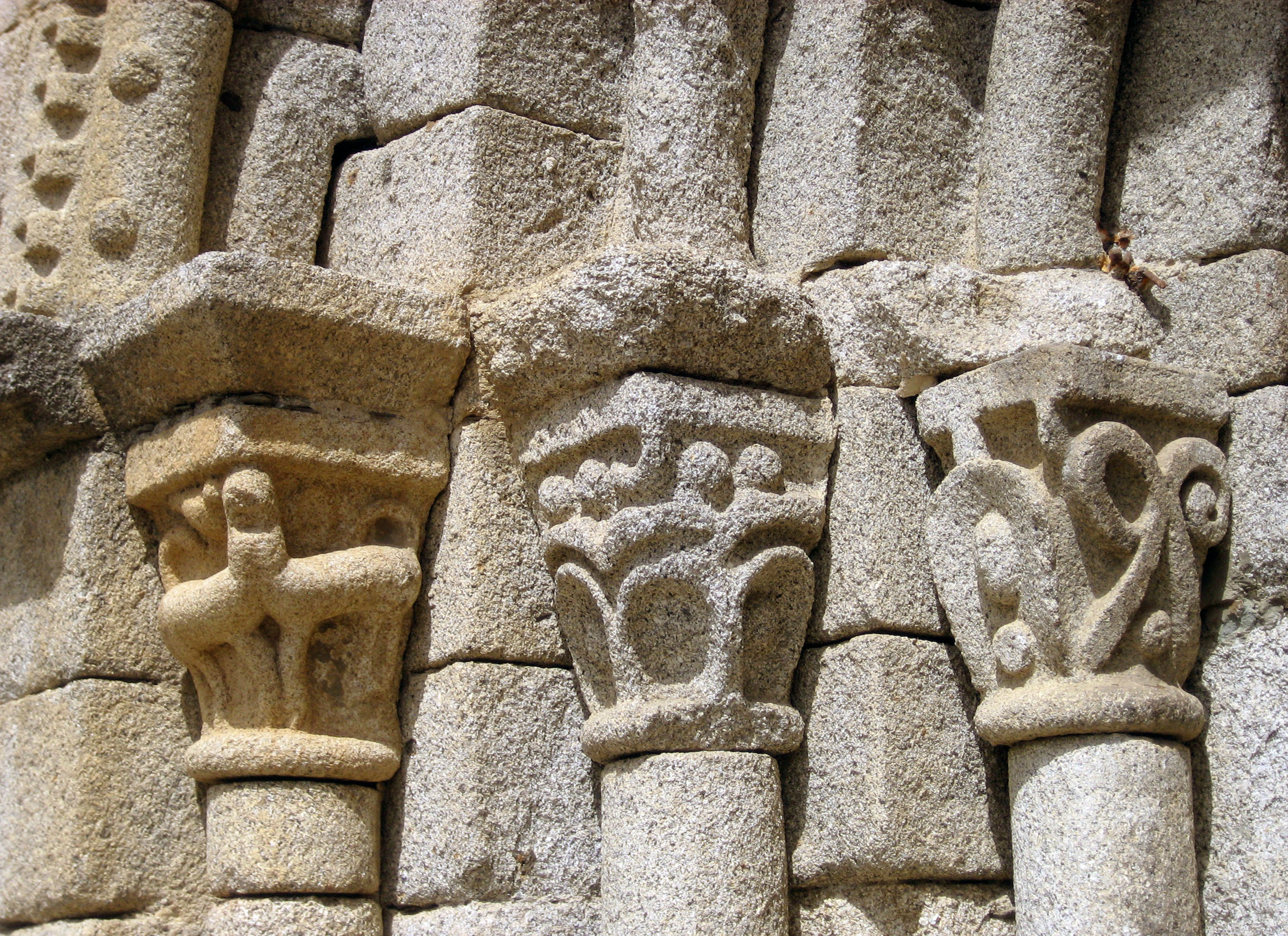 Capitells de la porta de l'església de Sant Esteve de Guils de Cerdanya. Catalunhya